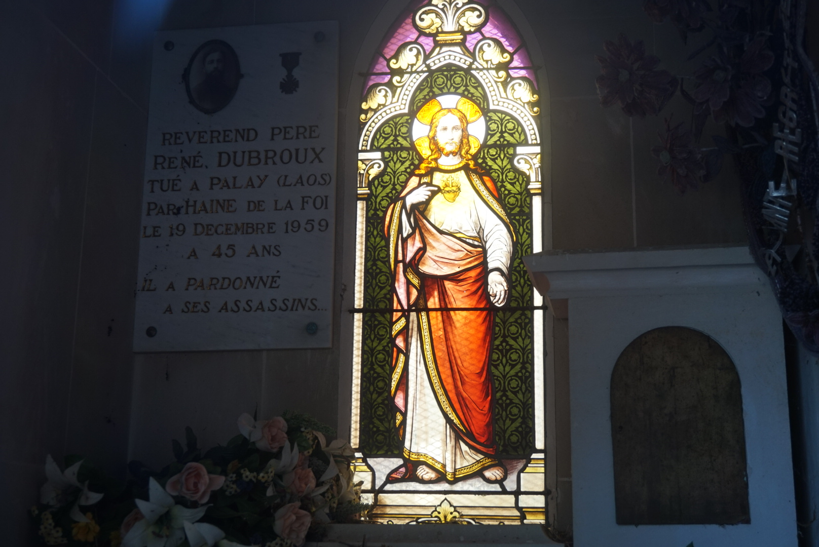 Chapelle du bienheureux René Dubroux au cimetière d'Haroué (Lorraine)